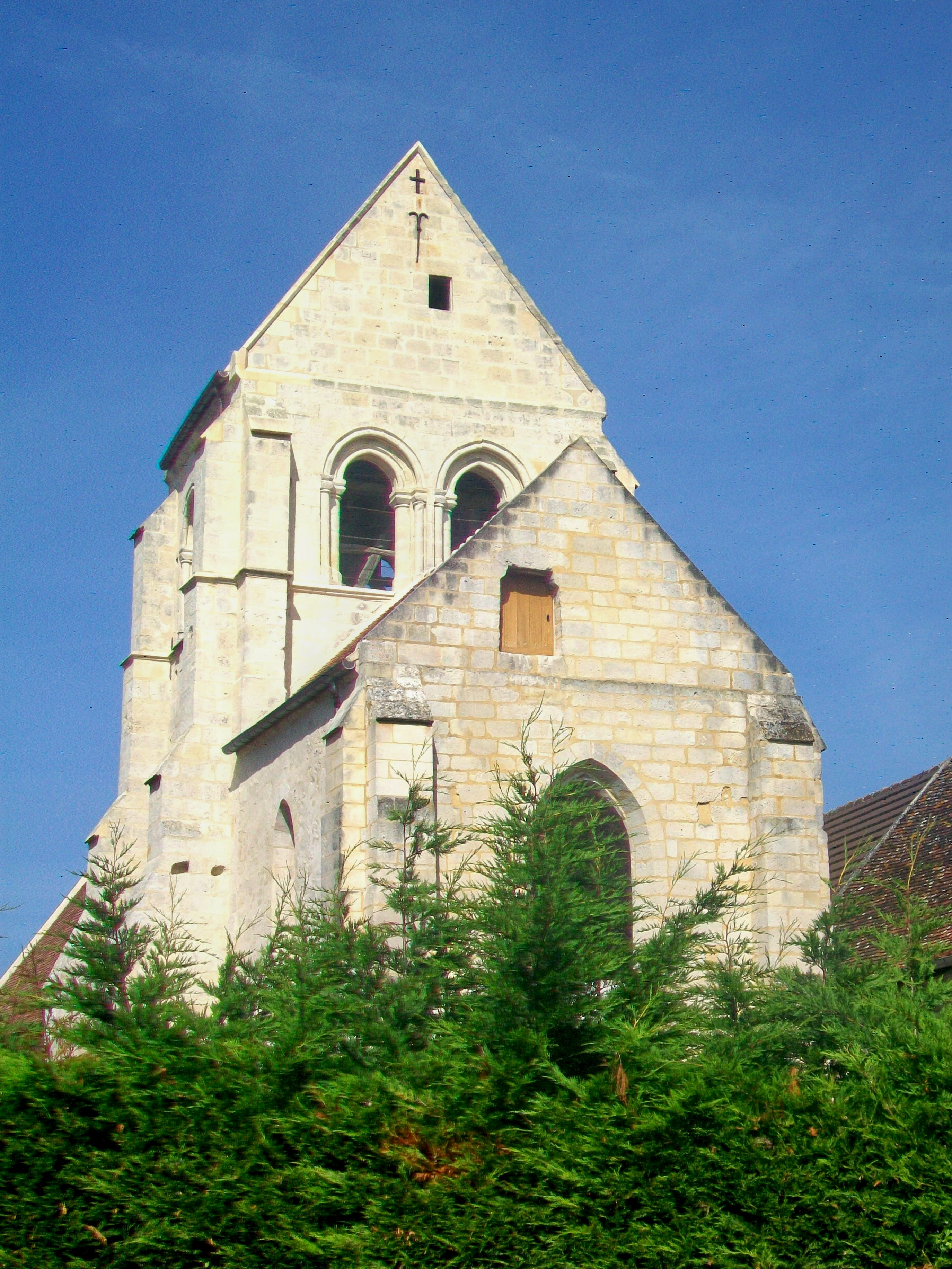 Chevet et clocher, depuis l'est.